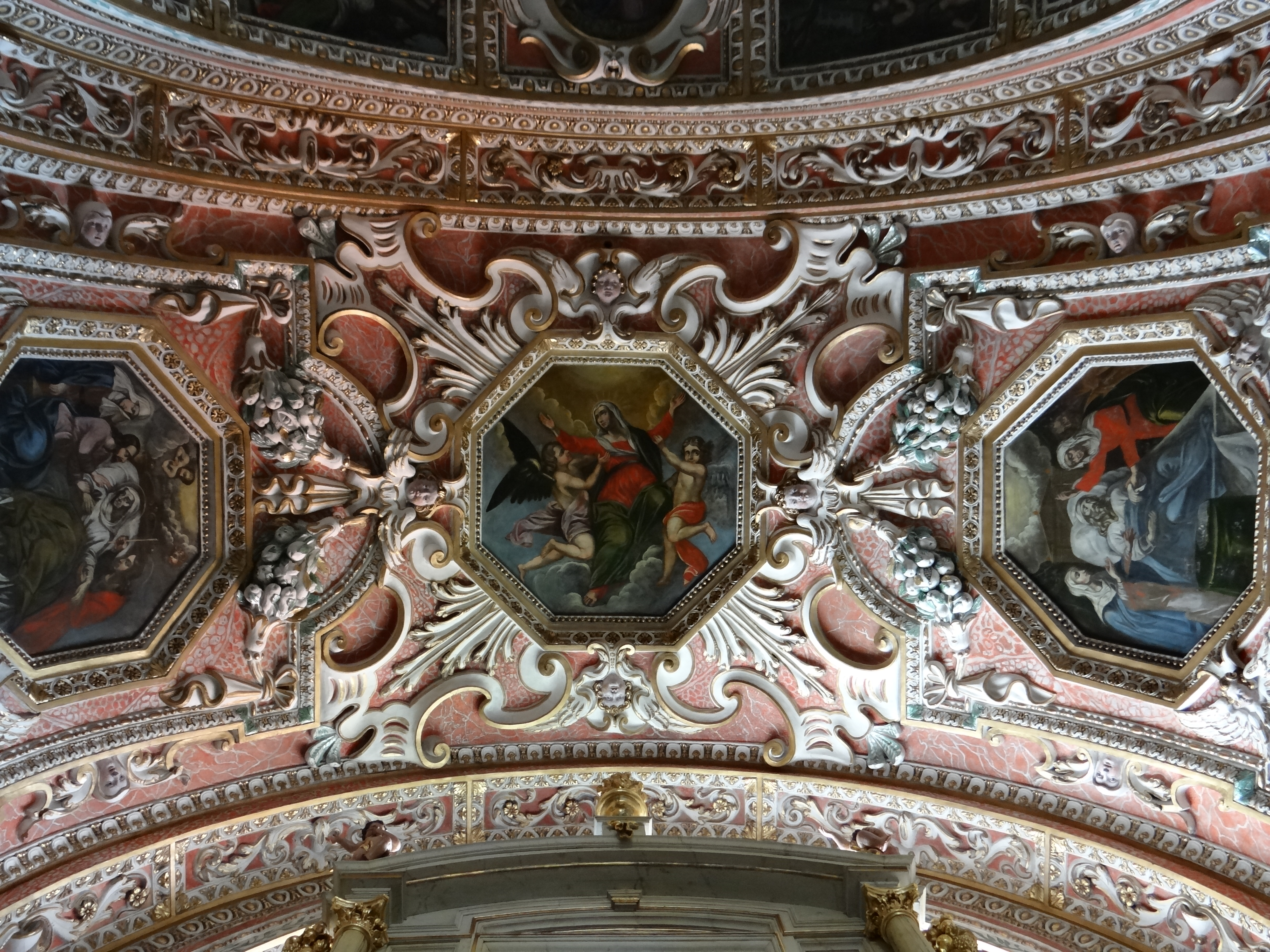 Kraków, kościół p.w. Wniebowzięcia NMP, 1618-1623